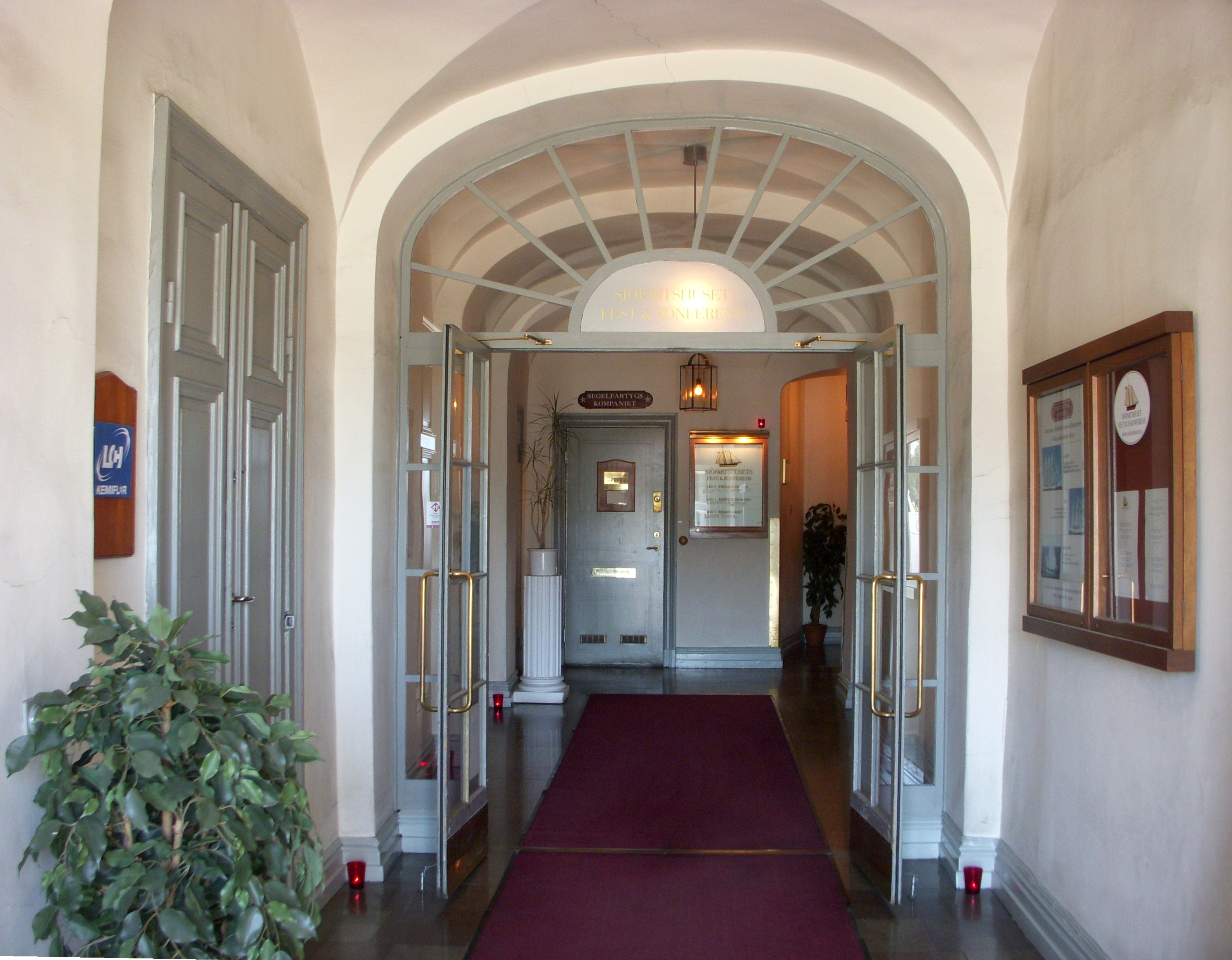 Sjöfartshuset, Skeppsbron, Stockholm, entré